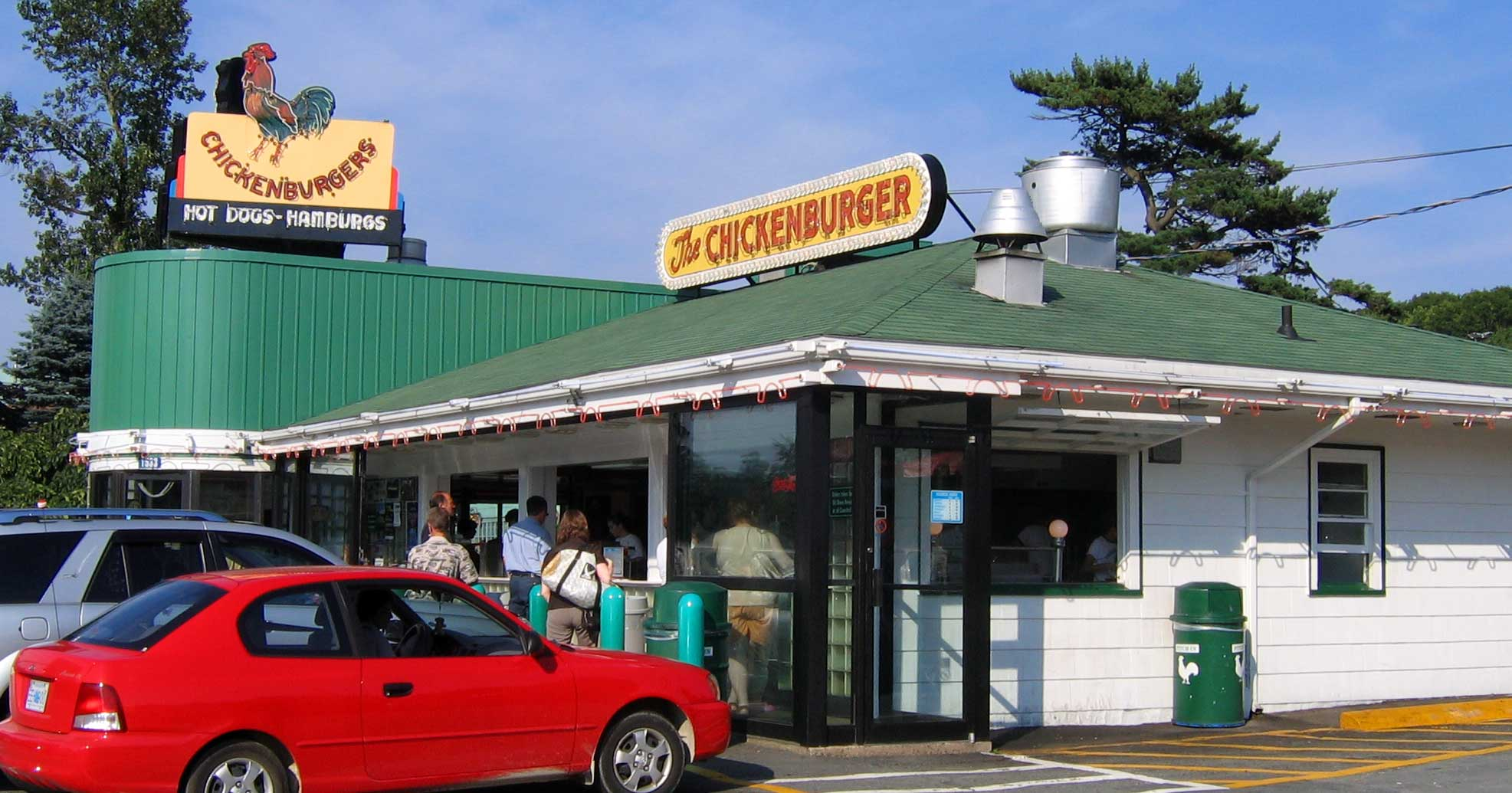 Chicken Burger Diner, Bedford (HRM) Nova Scotia